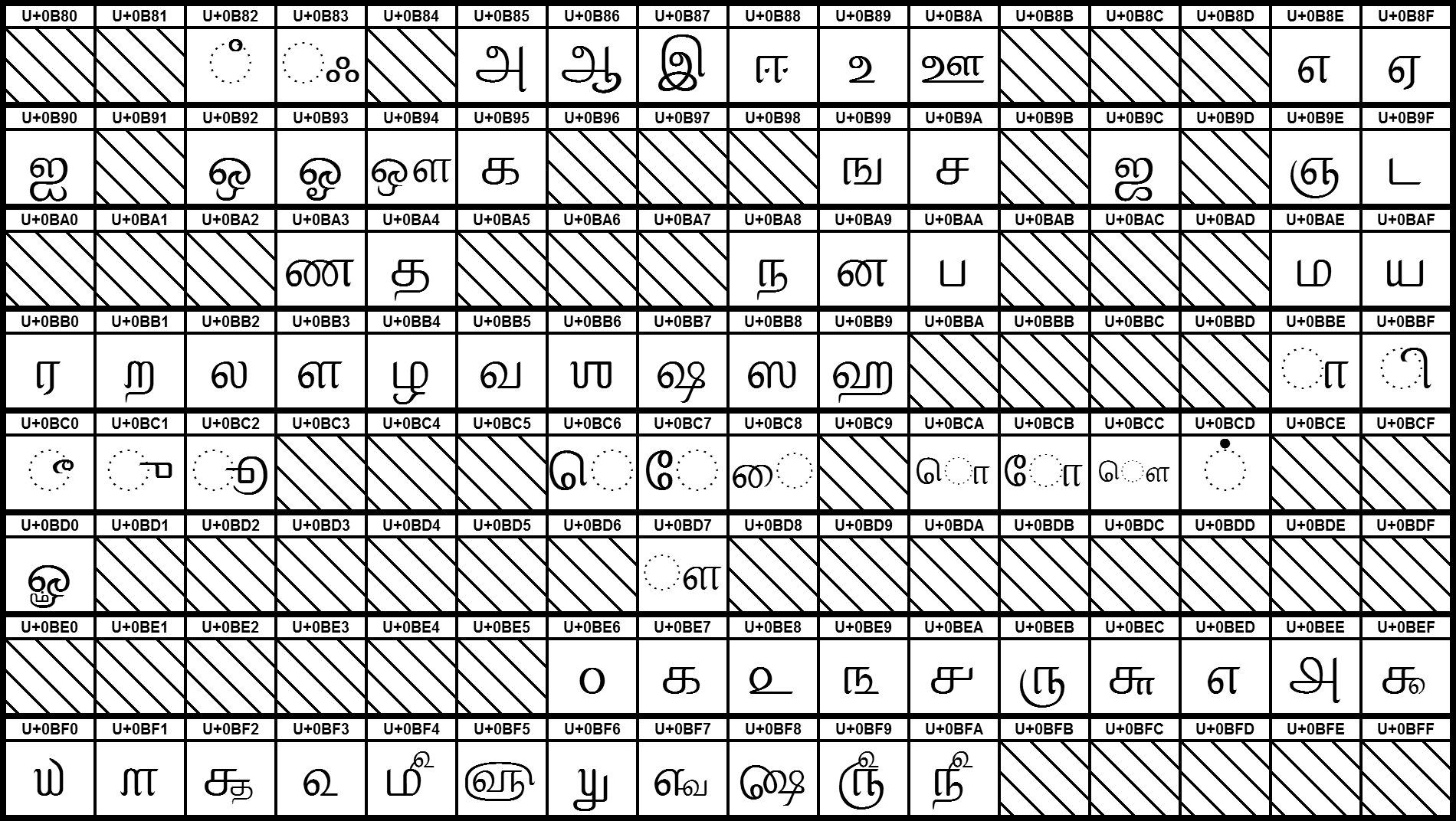 Grafiktafel für den Unicodeblock Tamilisch. Schraffierte Felder sind unbesetzte Codepoints.